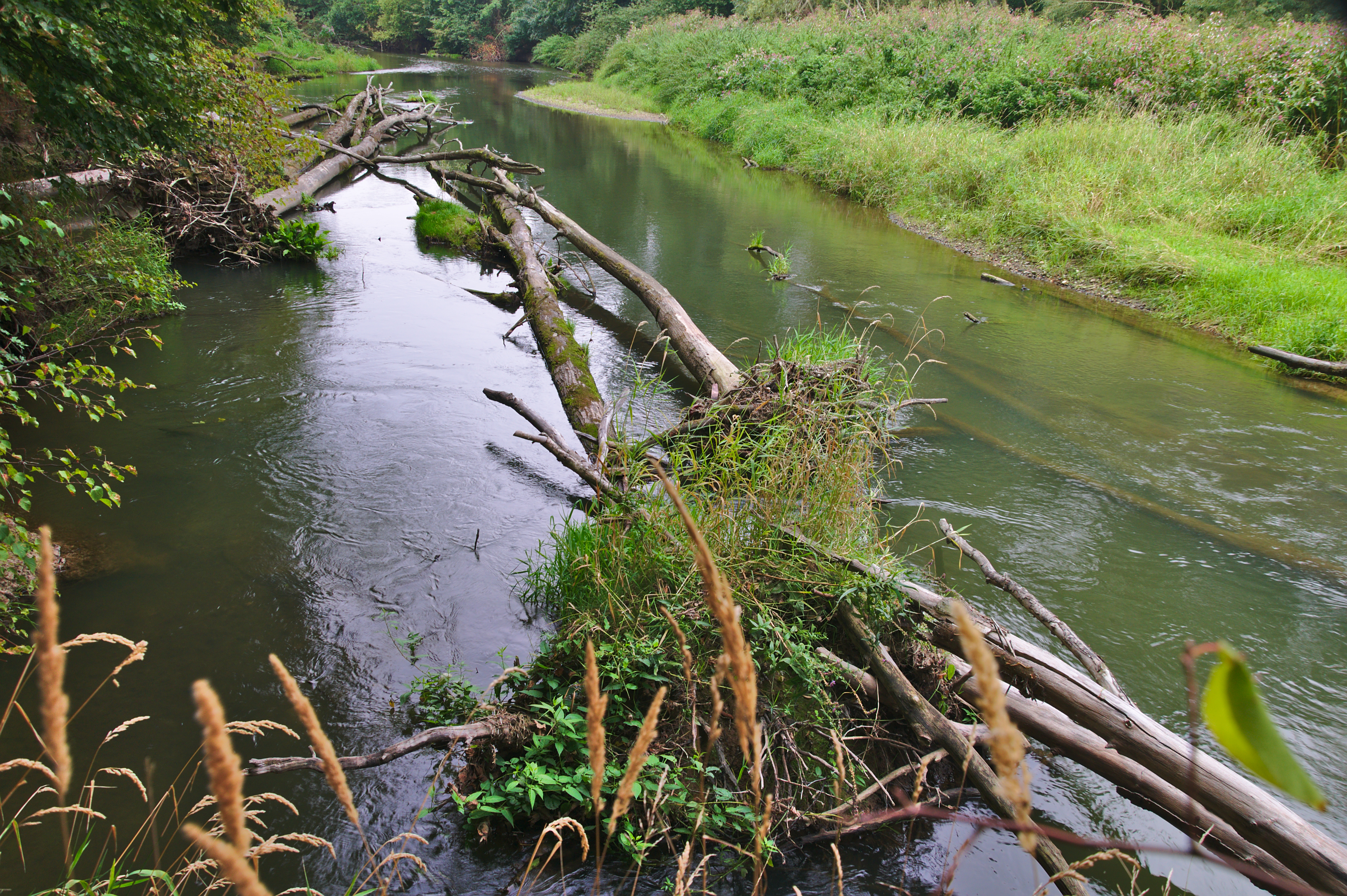 Morava v národní přírodní rezervaci Ramena řeky Moravy, Štěpánov u Olomouce, okres Olomouc